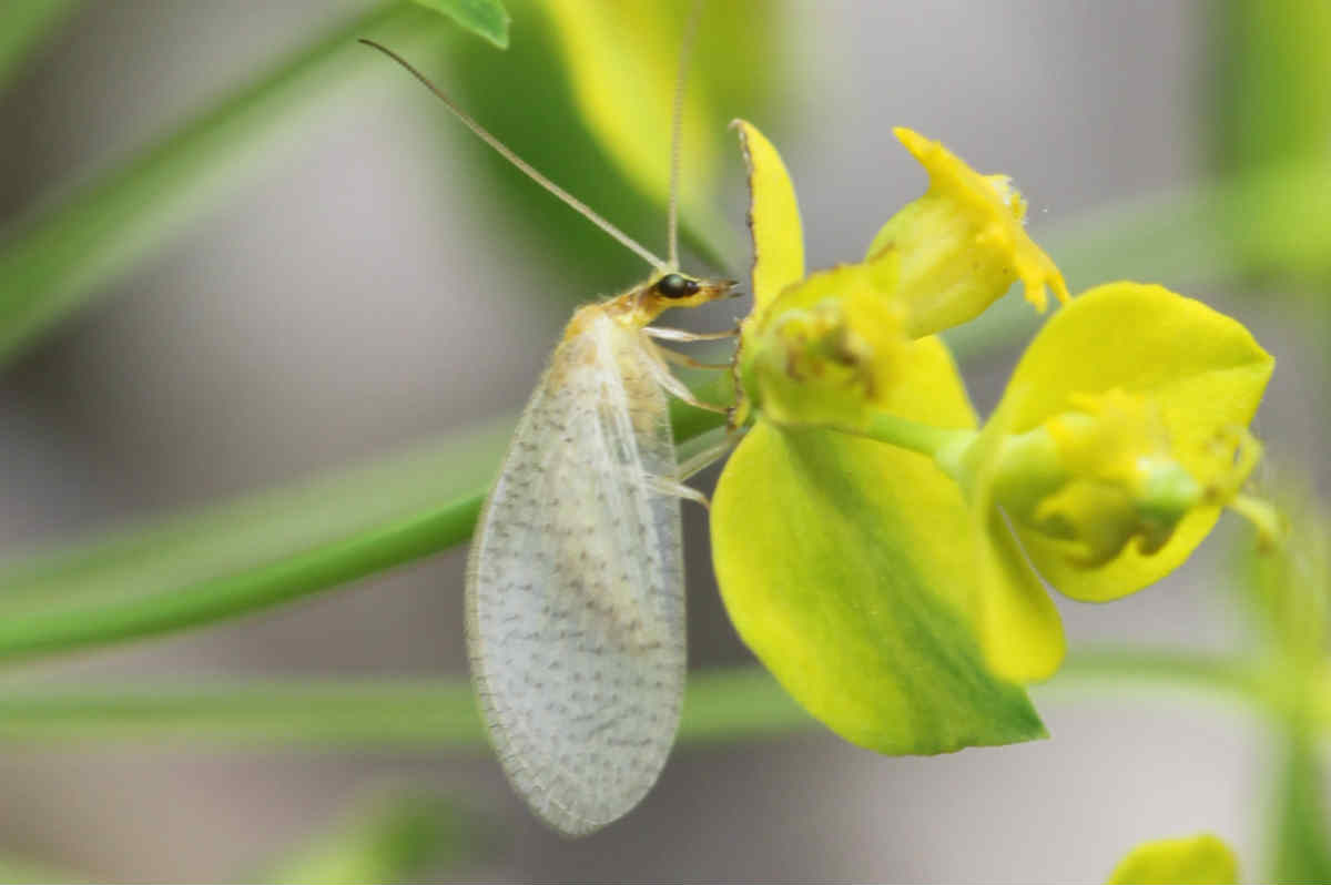 Hemerobius micans am 23.4.2017 in der Schwetzinger Hardt